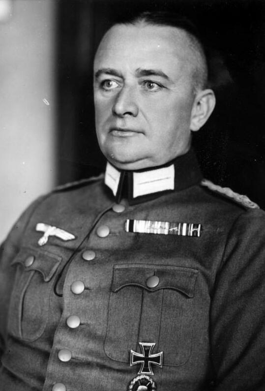 Erich Friderici Scherl Bilderdienst, Berlin Oberst [Erich] Friderici, Herausgabedatum: 4.4.39 [Porträt Oberst Erich Friderici] Abgebildete Personen: Friderici, Erich: Generalleutnant, Ritterkreuz (RK), Heer, Deutschland